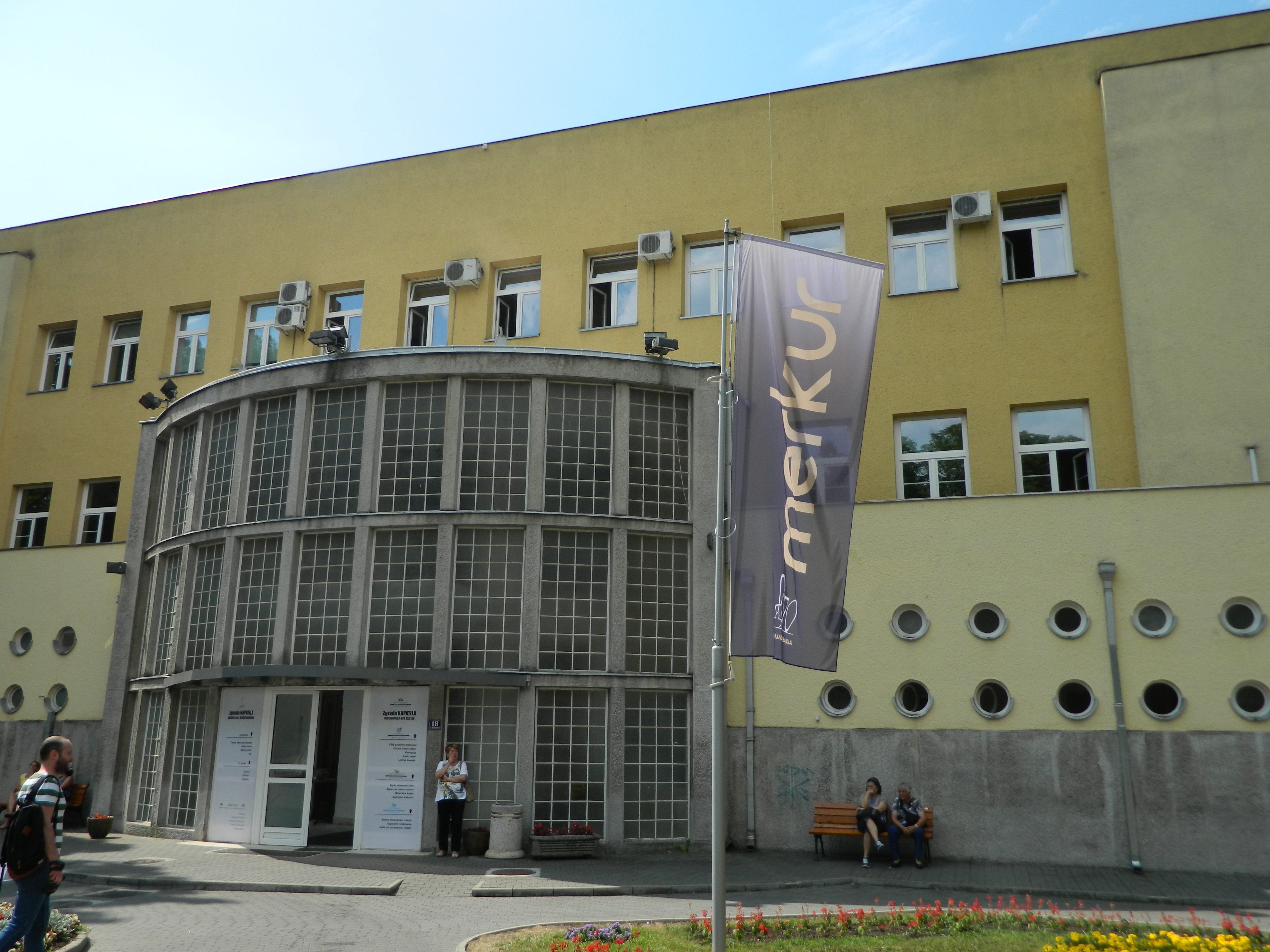 Specijalna bolnica "Merkur", Vrnjačka Banja